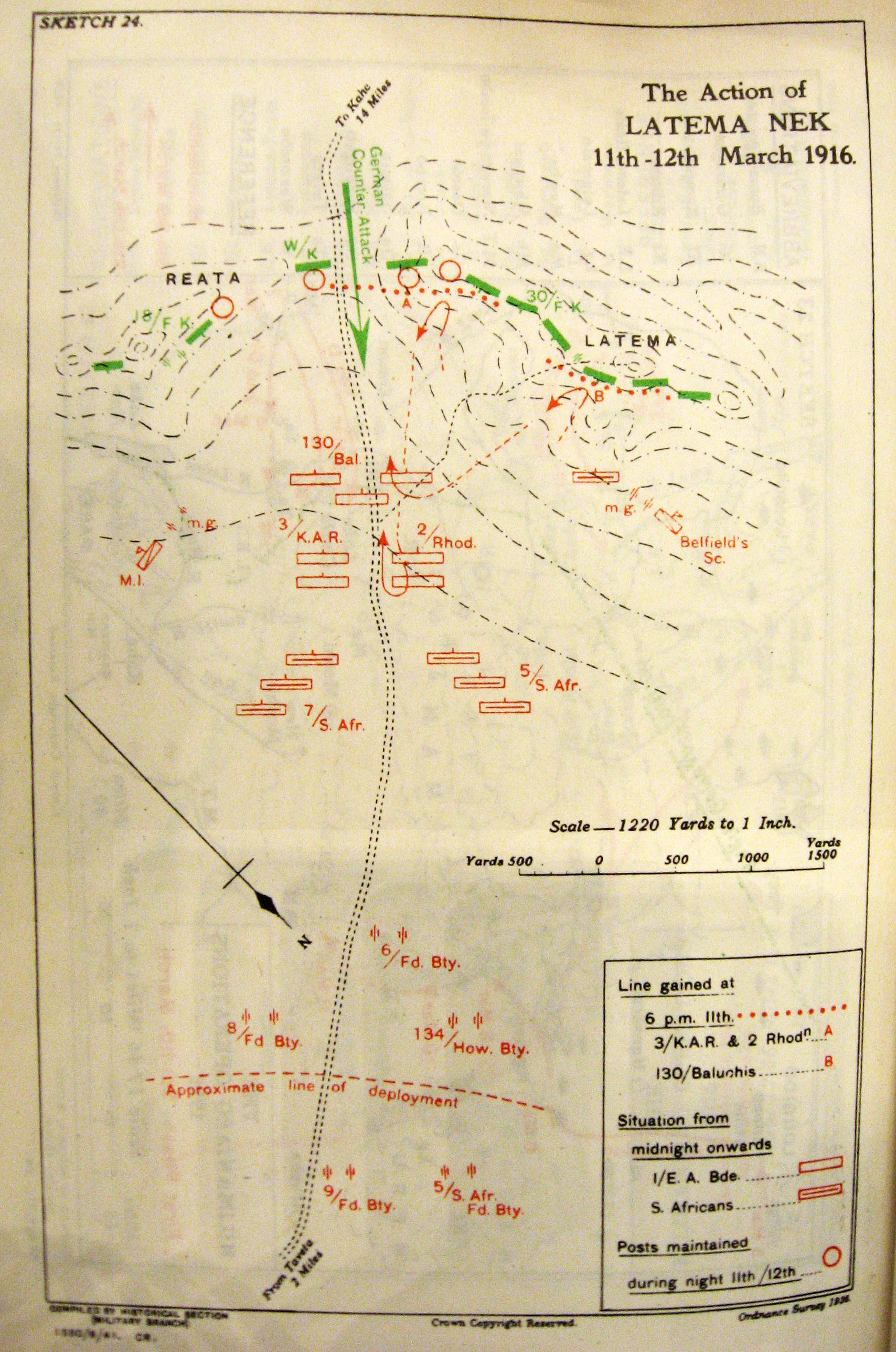 Map of the battle of Latema Nek, 11–12 February 1916, British-East-Africa